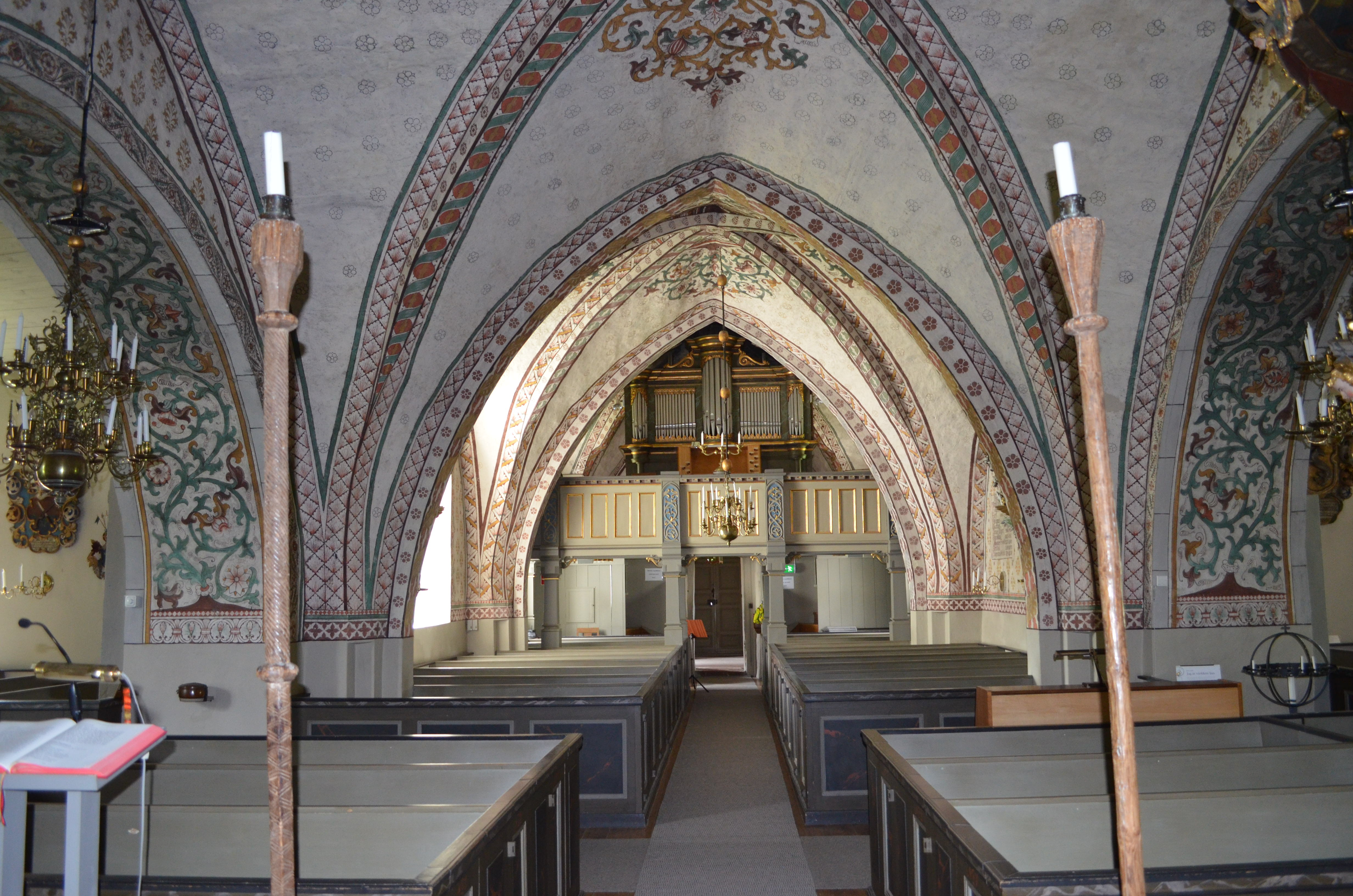 Kyrkosalen